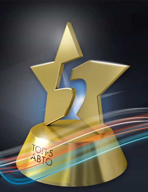 Приз победителей премии "ТОП-5 АВТО"